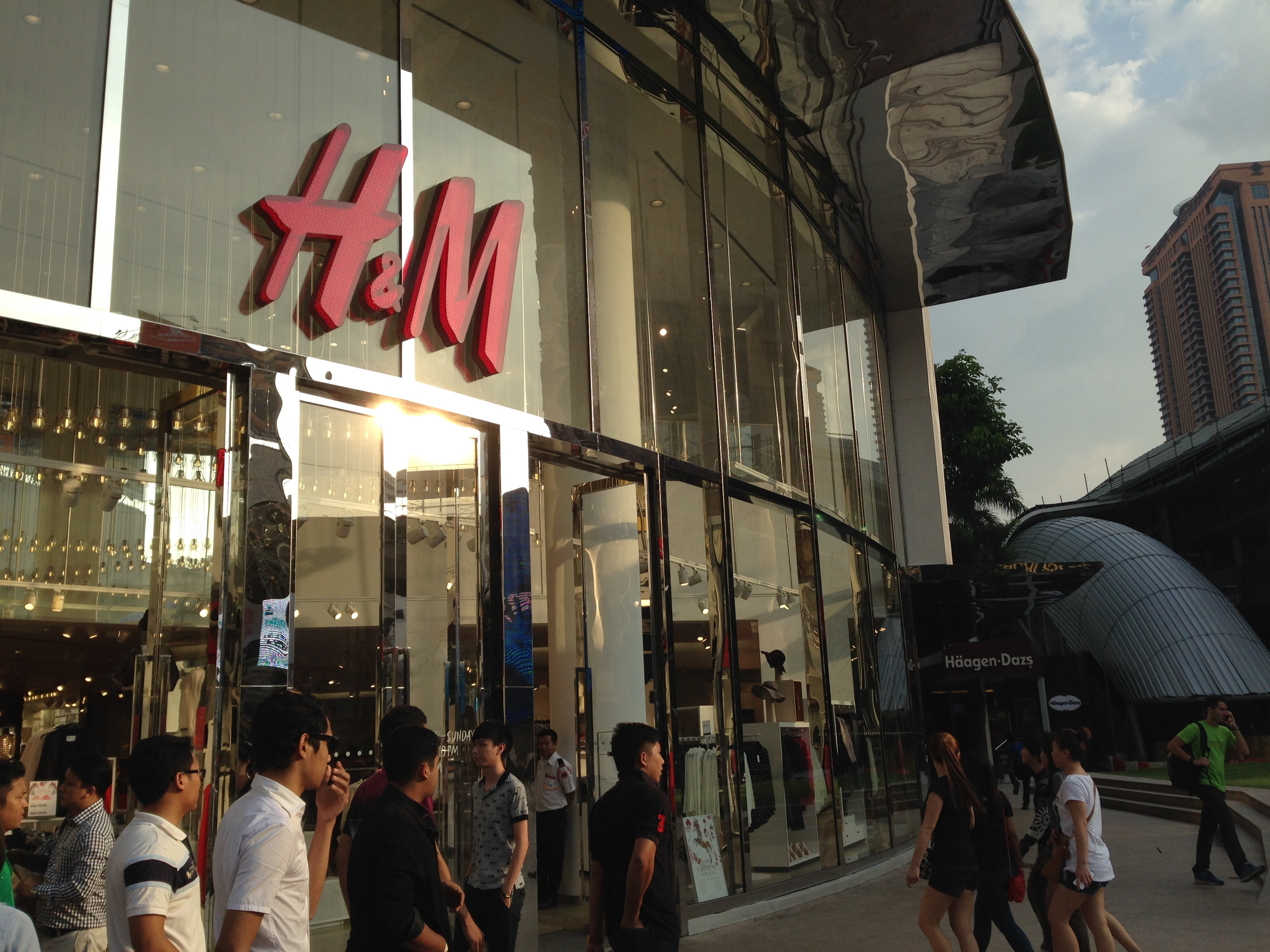 Lot 10 H&M entrance